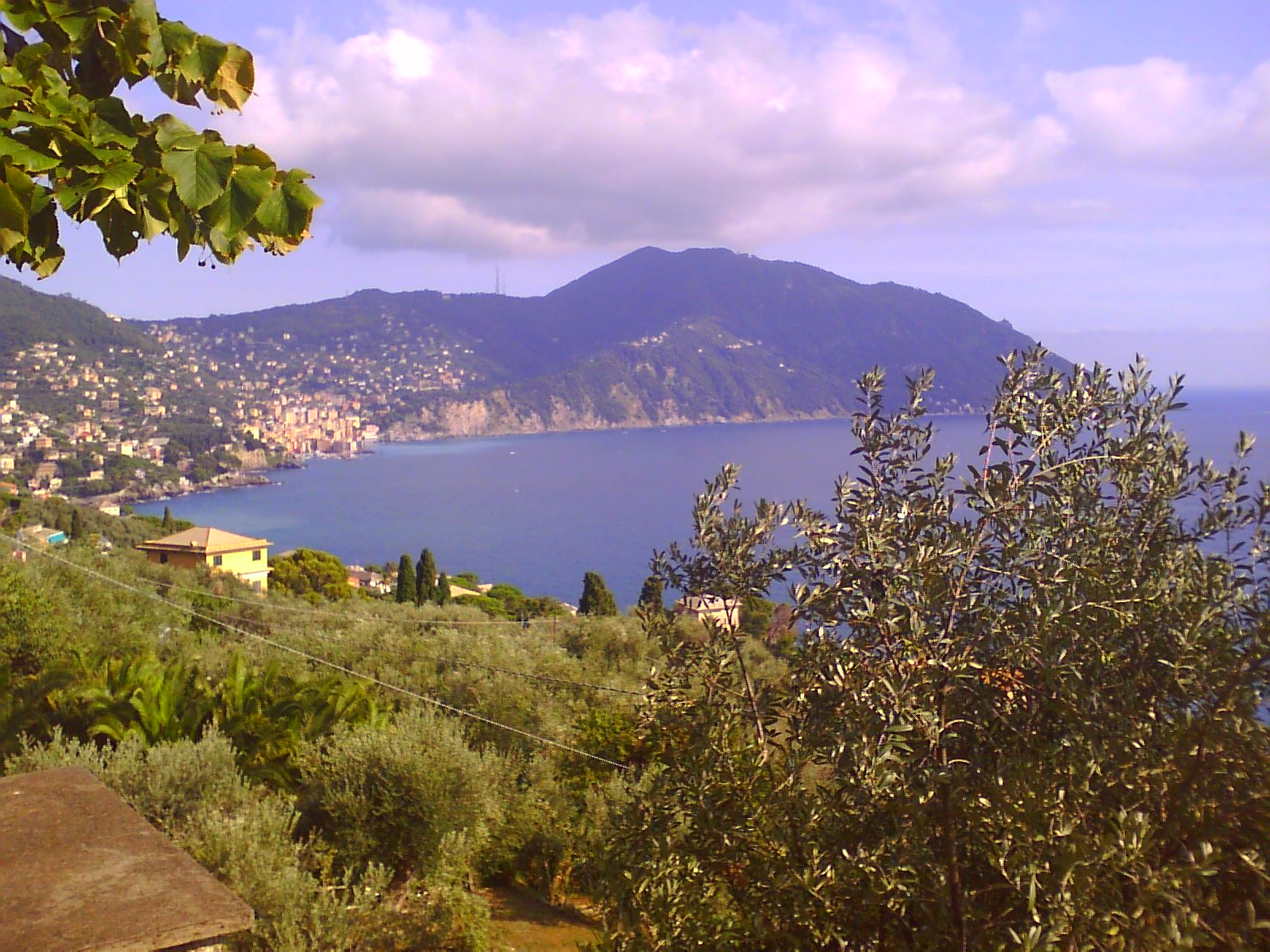 Recco, Liguria, Italia